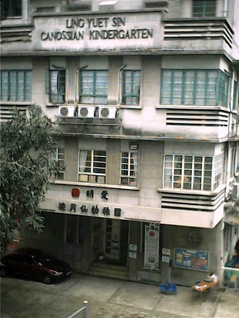 明愛凌月仙幼稚園 (由李陞小學走廊外望的古雅建築物) 香港薄扶林道54號地下 DaZeLen